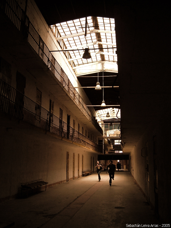 Ex Cárcel de Valparaíso, Chile. Ubicada en el Cerro Cárcel y ahora habilitada como centro cultural abierto a toda la comunidad. Fotografía tomada por mí (Sebastián Leiva).